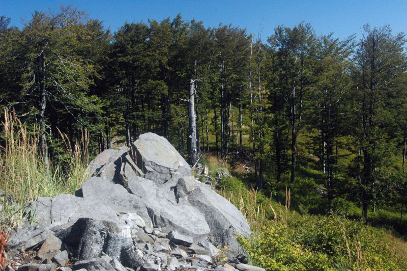 Vrchol Orlieho kameňa